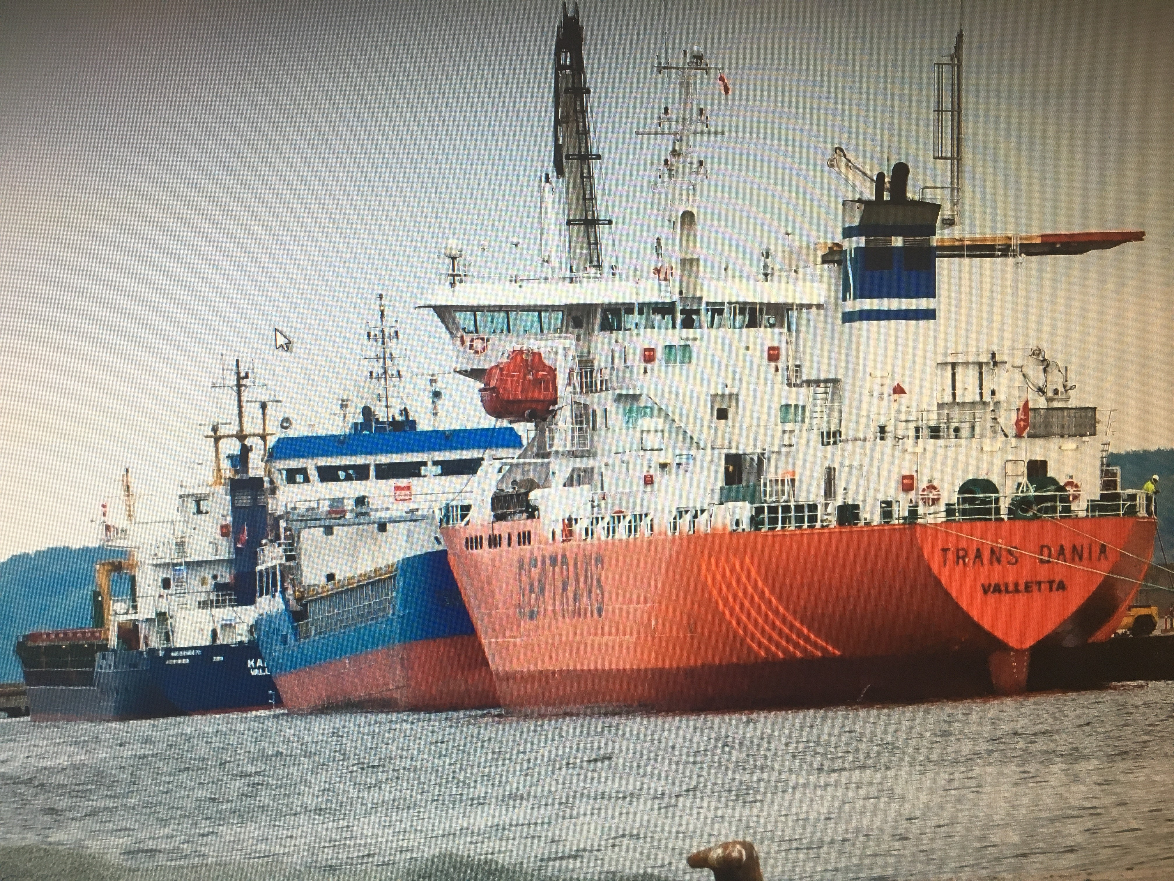 Travlhed på Kolding Havn